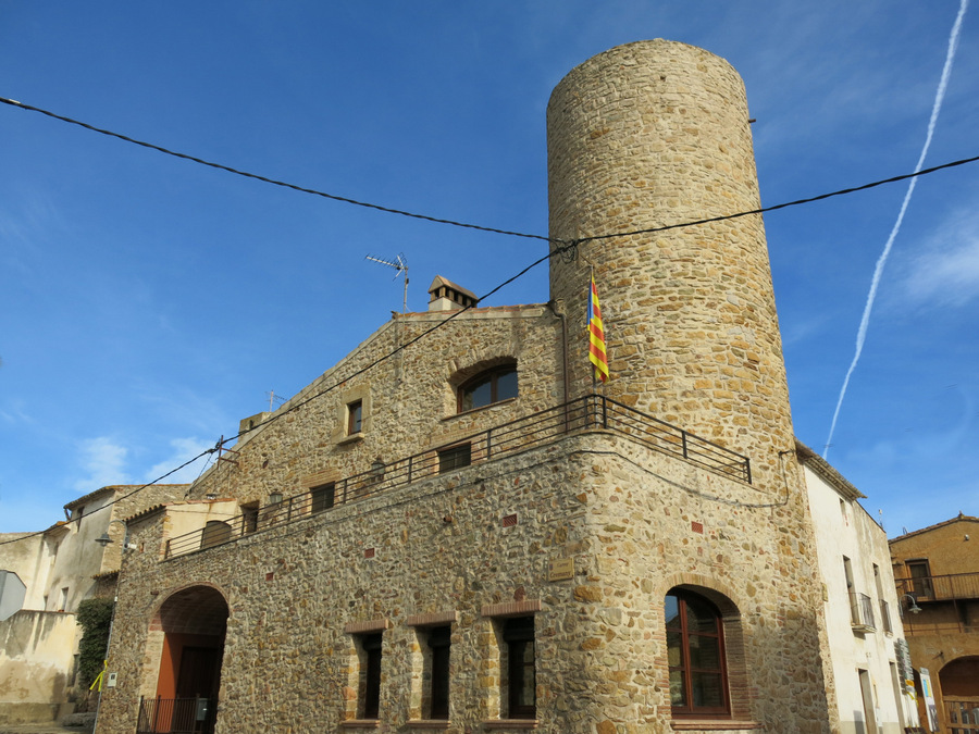 Torre de Regencós - Baix Empordà - Catalunya